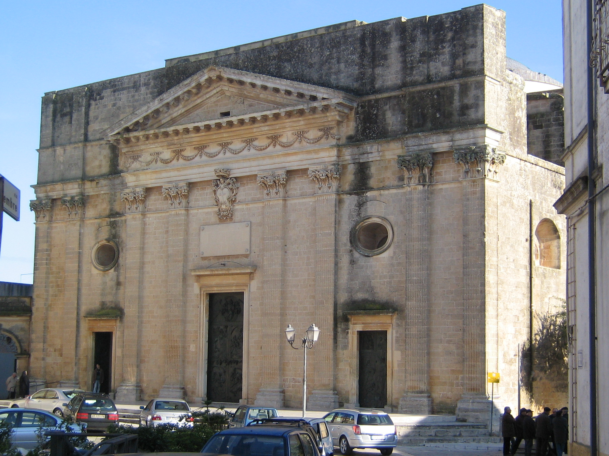 Alessano: Chiesa Madre di San Salvatore, già Cattedrale della Diocesi soppressa di Alessano.